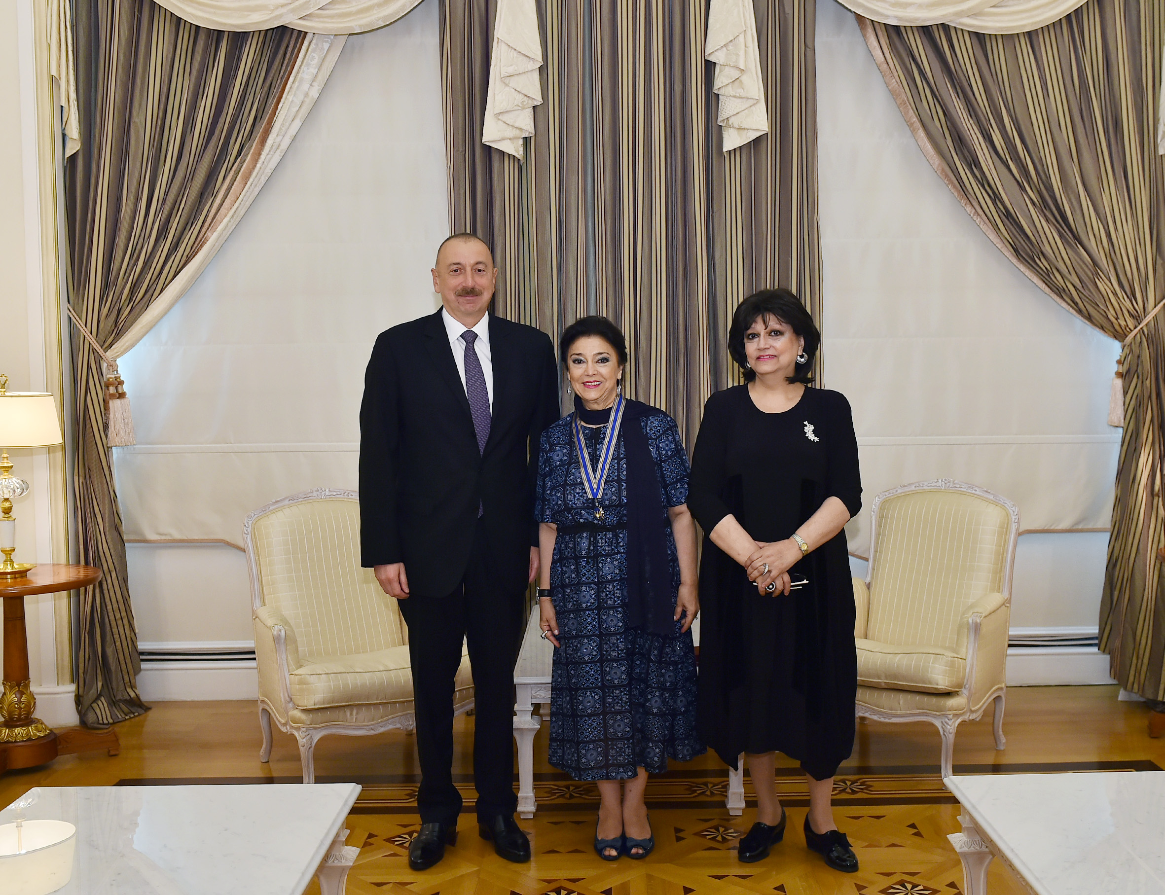 İlham Əliyev Xalq artisti Fidan Qasımovaya “İstiqlal” ordeni təqdim etdikdən sonra çəkilən xatirə fotoşəkli.